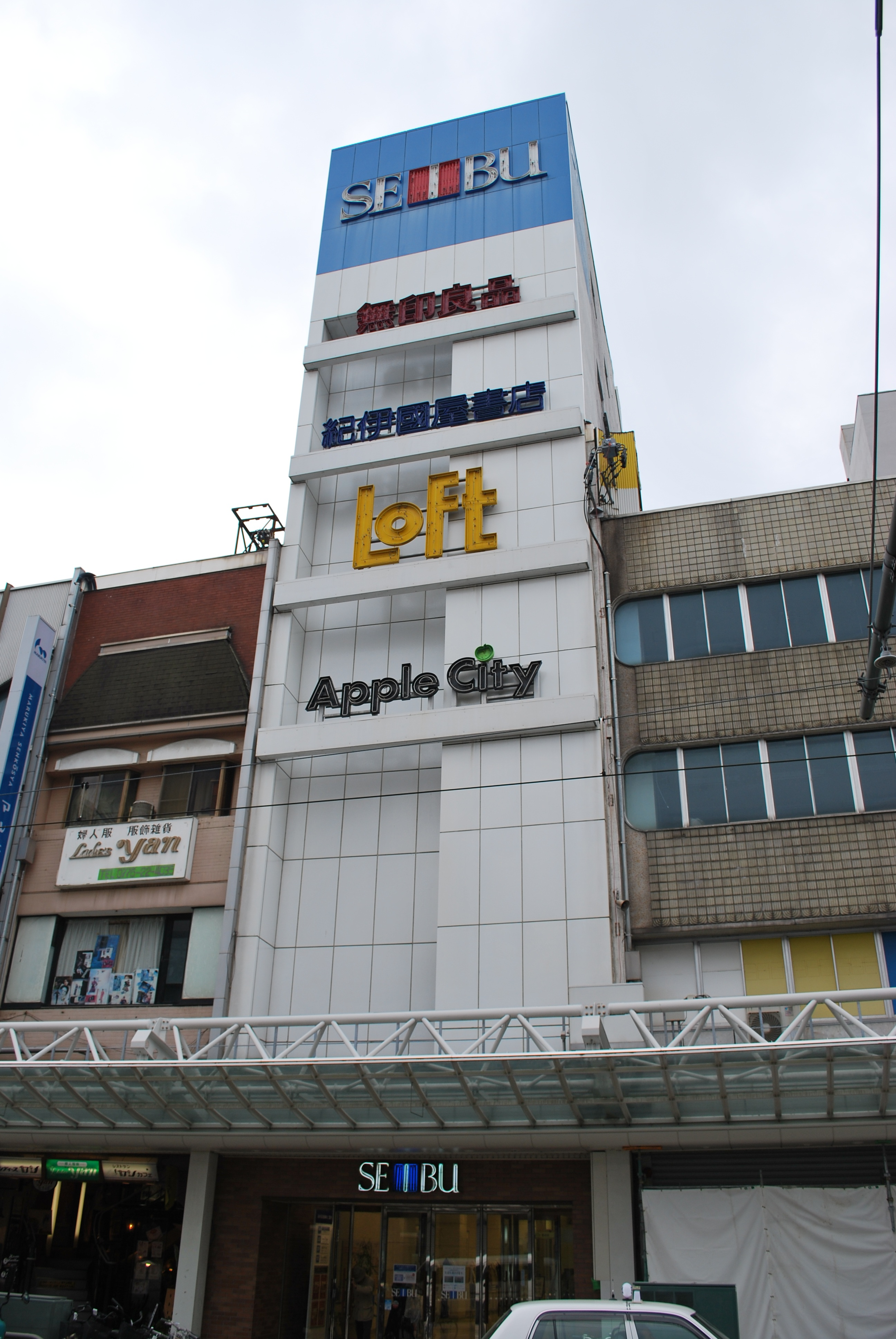 西武福井店新館。2011年3月15日撮影。